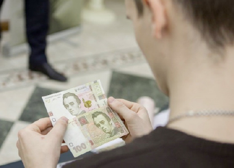 Двісті гривень в руках